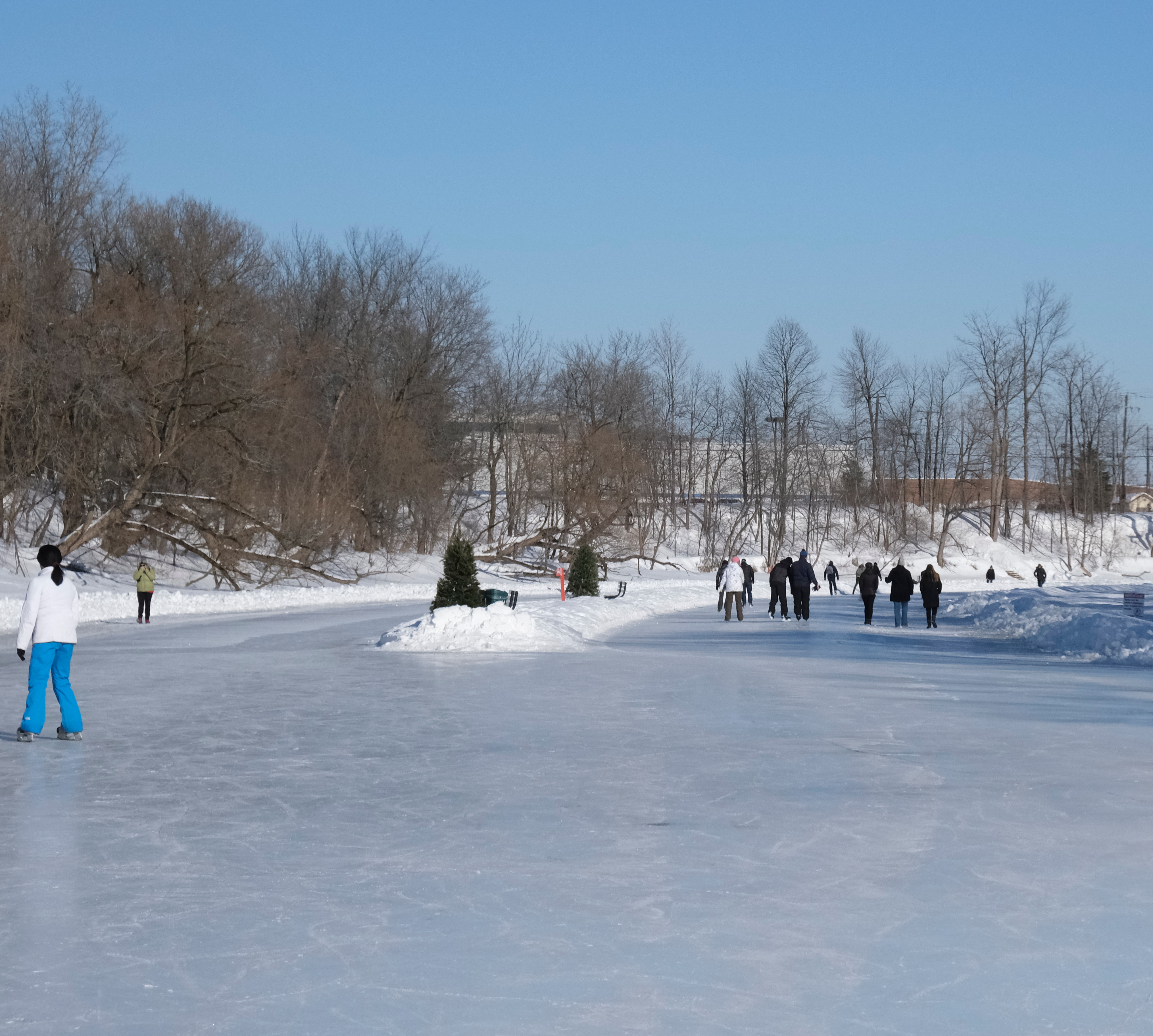 La patinoire consiste en deux voies de glace entretenue pendant l'hiver pour le patin, la marche et des activités culturelles.